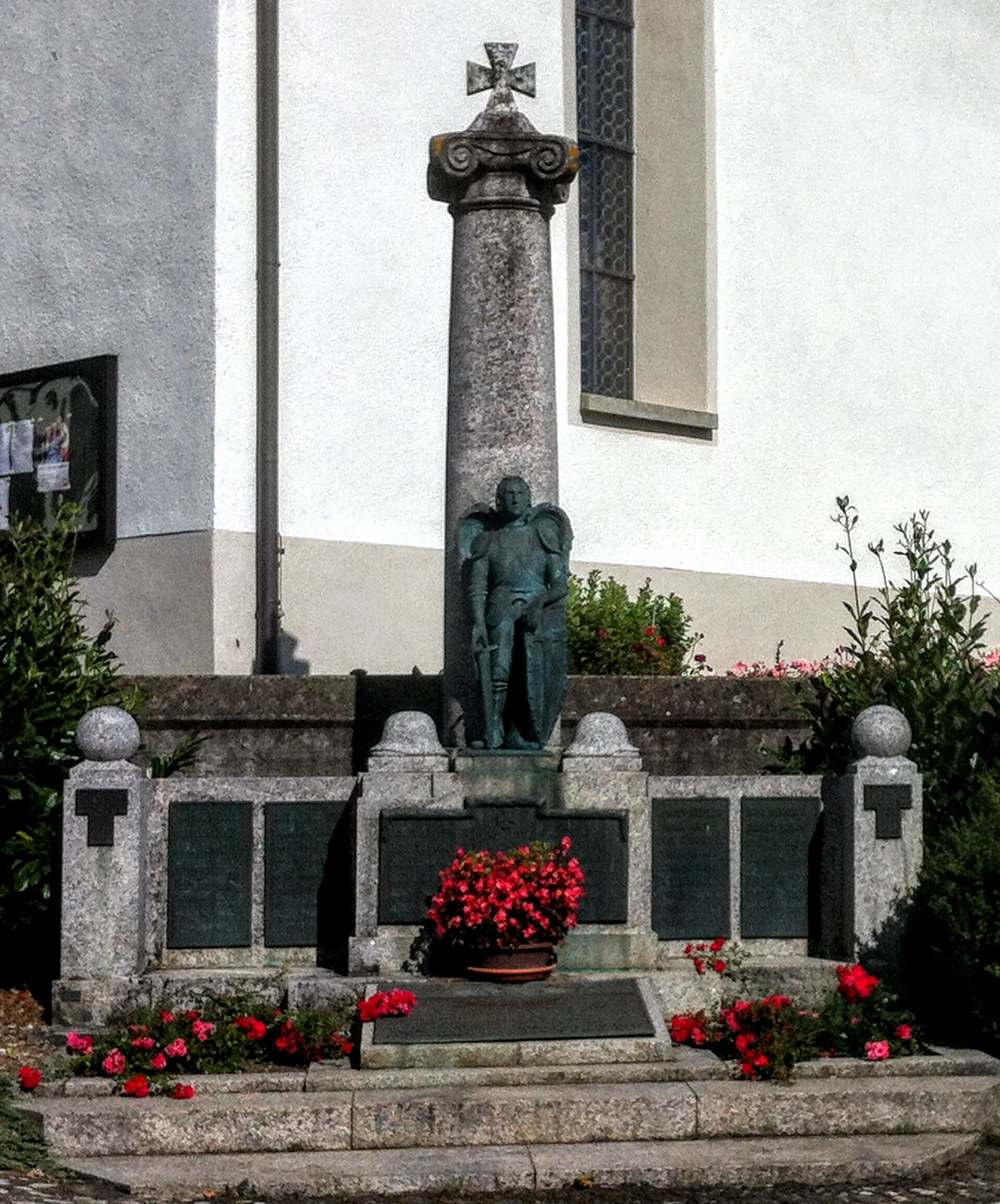 Deutschland (D) - Baden-Württemberg (BW) - Landkreis Konstanz (KN) - Mühlingen, Ortsteil Gallmannsweil: Kriegerdenkmal bei der Kirche